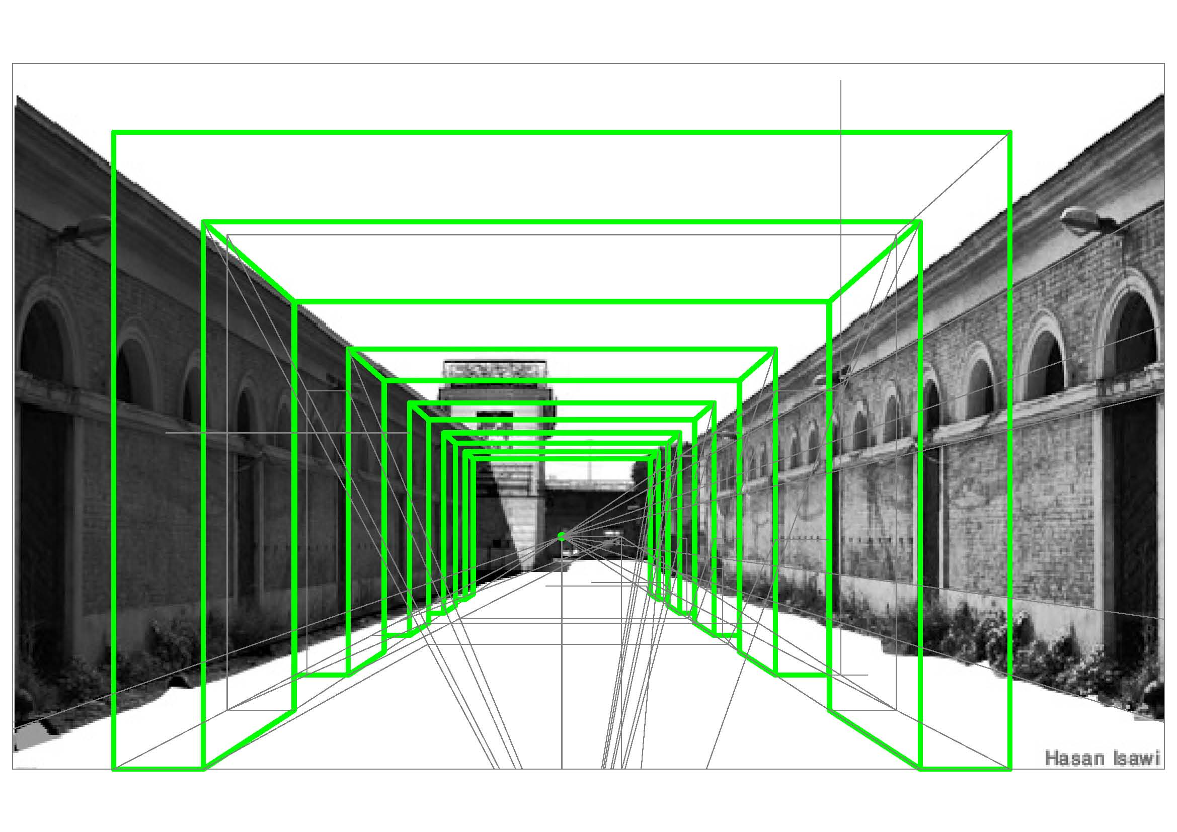 prospettiva centrale